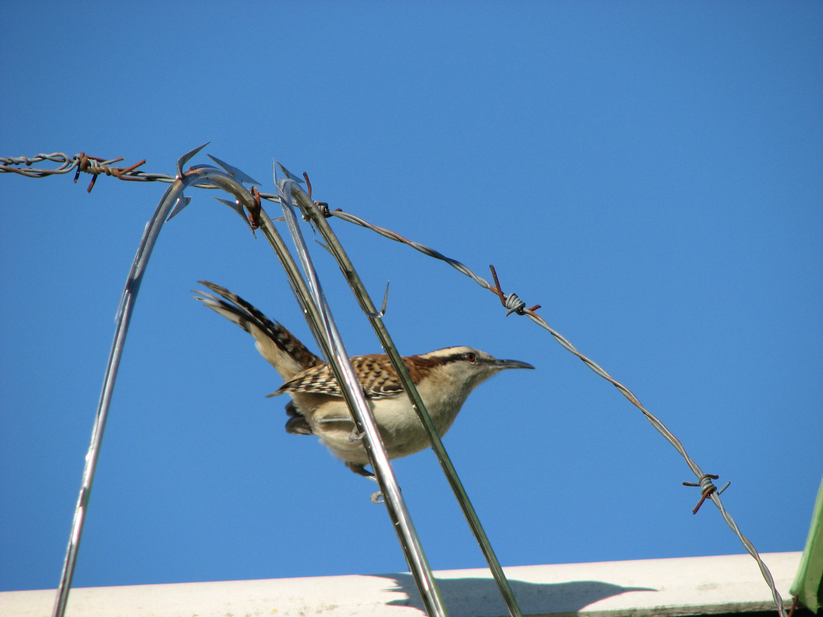 Rufous-naped Wren (Matraquita_Nuquirrufa)- Santa Tecla, El Salvador